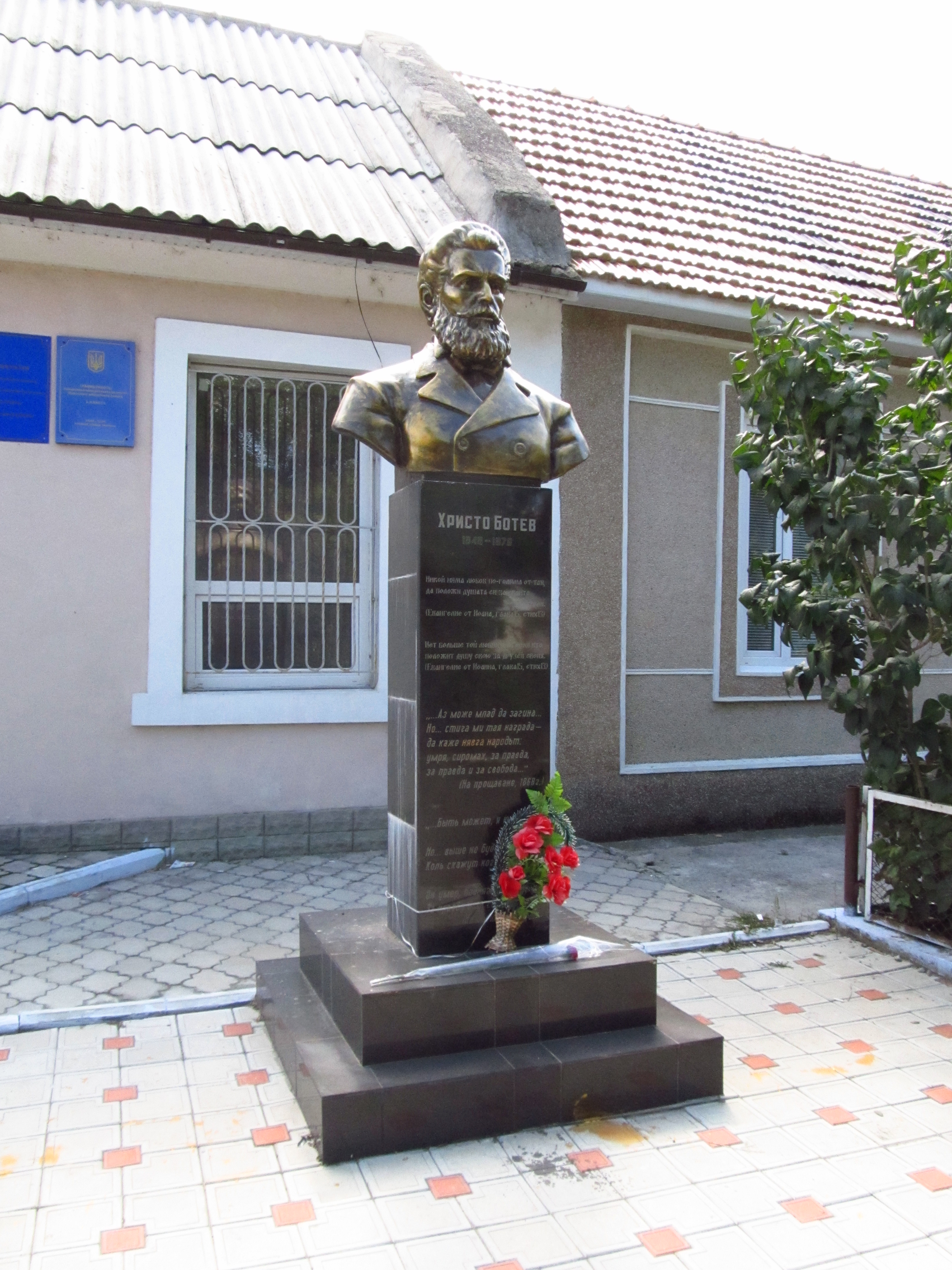 Паметник на Христо Ботев в Арциз. Открит на 2 юни 2010 г.